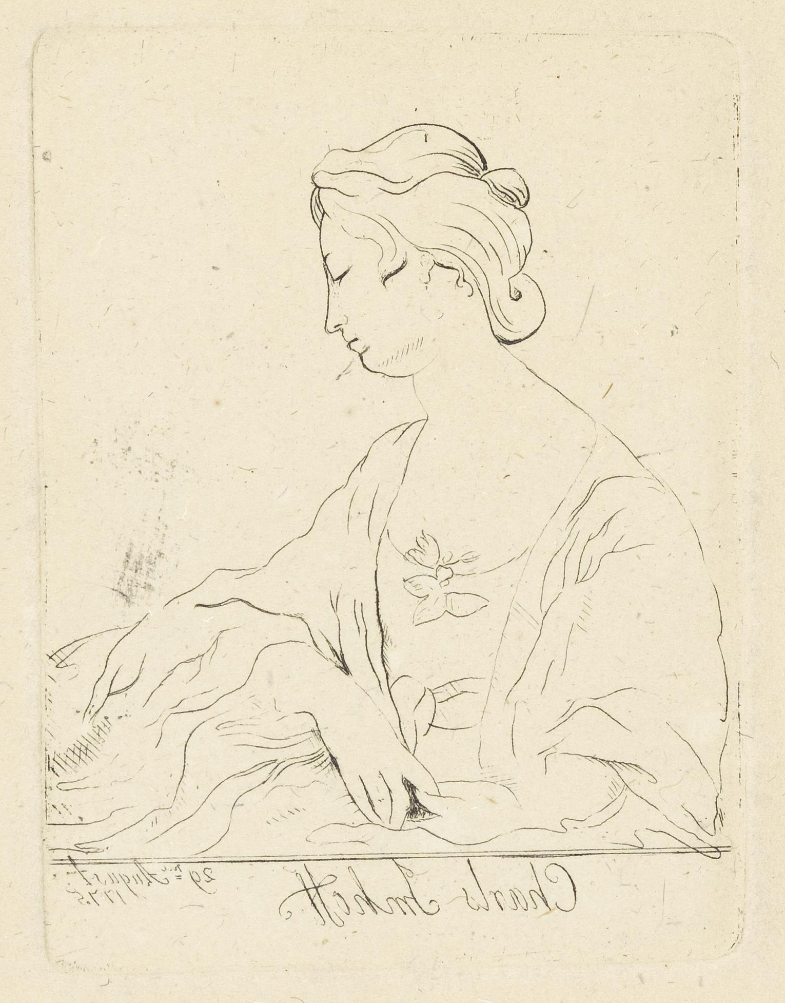 Bildnis der Luise von Imhoff, geb. von Schardt; Radierung, 75 x 55 mm (Platte) Nürnberg, Germanisches Nationalmuseum, Graphische Sammlung (Paul Wolfgang Merkel'sche Familienstiftung), Inventar-Nr. MP 11911b, Kapsel-Nr. 204